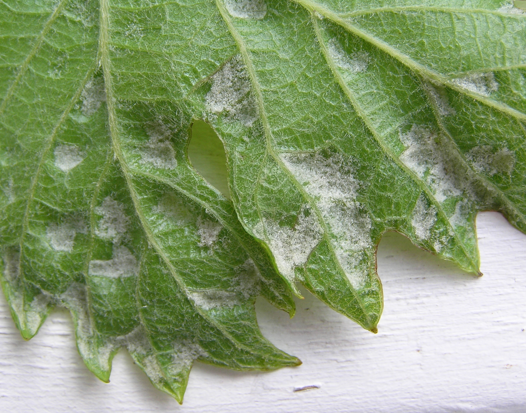 Von der Pockenmilbe / Blattgallmilbe (Eriophyes vitis) befallenes Blatt einer Weinrebe (Blattunterseite, Teilansicht, aufgenommen in Waiblingen, Deutschland).